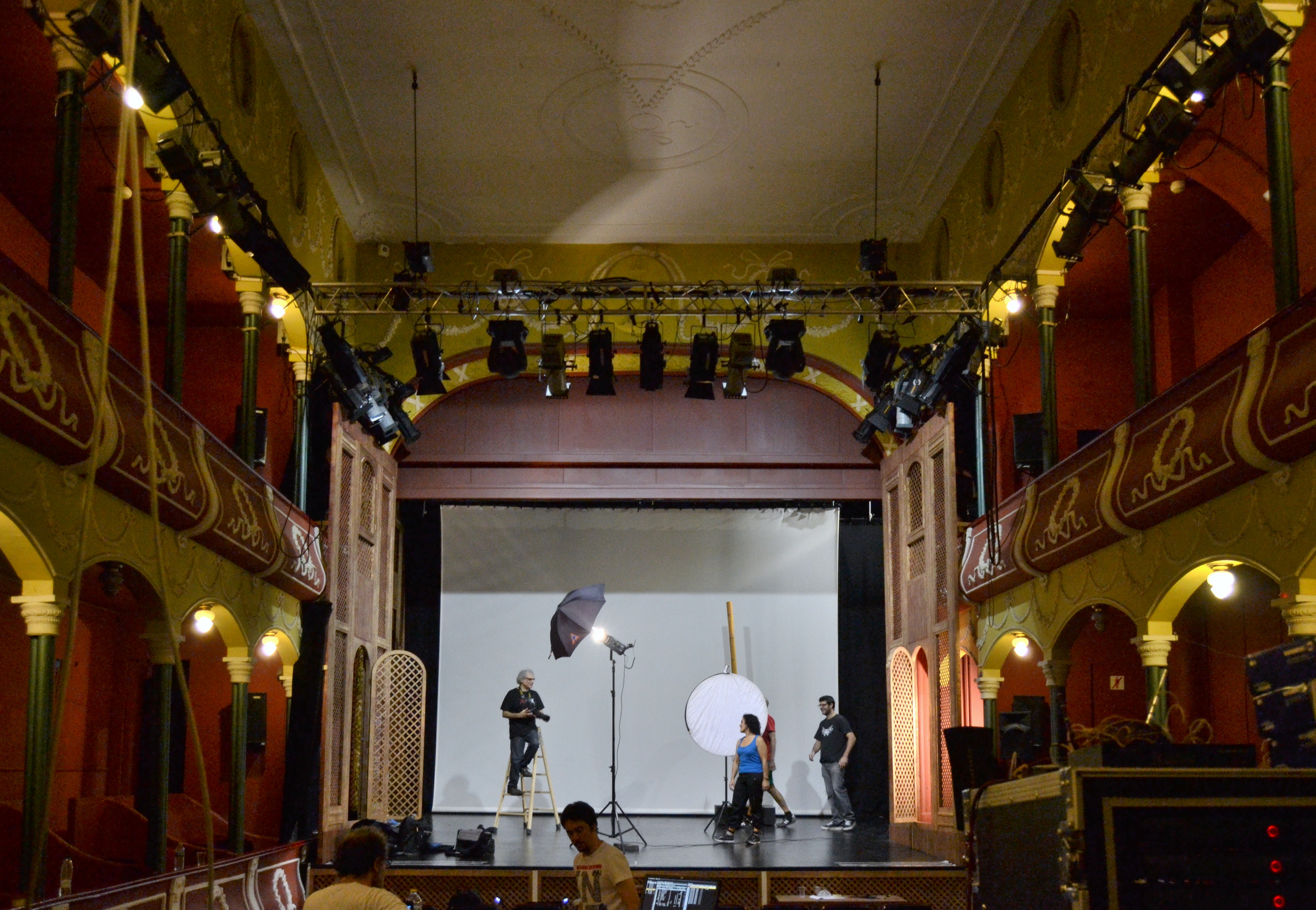 Escalante Centre Teatral de València.